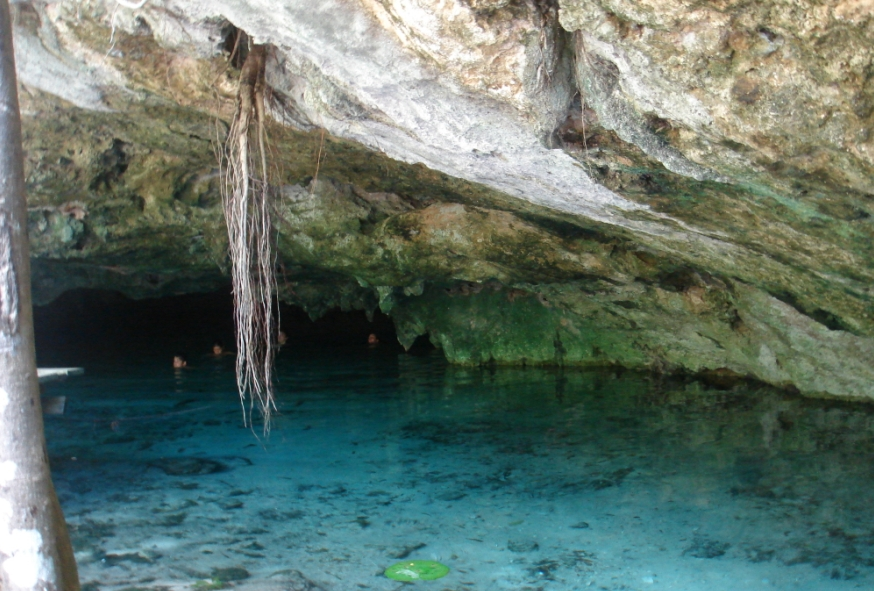 Existen varios cenotes en México, a su alrededor tienen vegetación y en el agua también, la mayoría de llos suelen tener profundidades muy altas, por lo tanto se ha adecuado levemente para que se puedan realizar clavados los excursionistas, son de agua dulce. Estos tienen historias muy interesantes, se han utilizado en México de diferentes formas ya que en el mundo maya eran selectos para actividades de los dioses de ese tiempo.